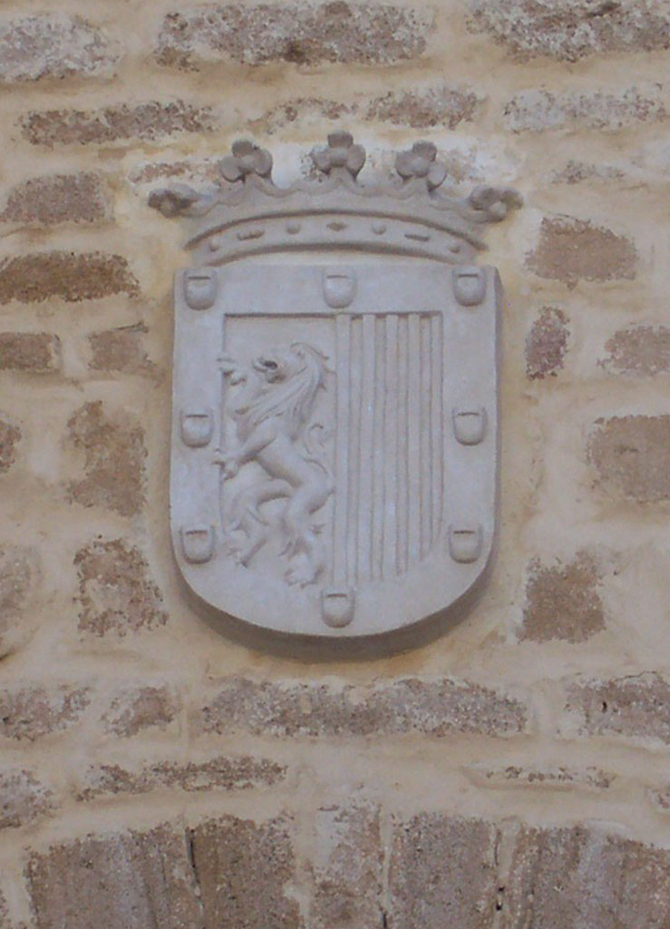 Escudo del linaje Ponce de León, sobre la puerta del Castillo de Luna, en Rota-Cádiz-Andalucía-España